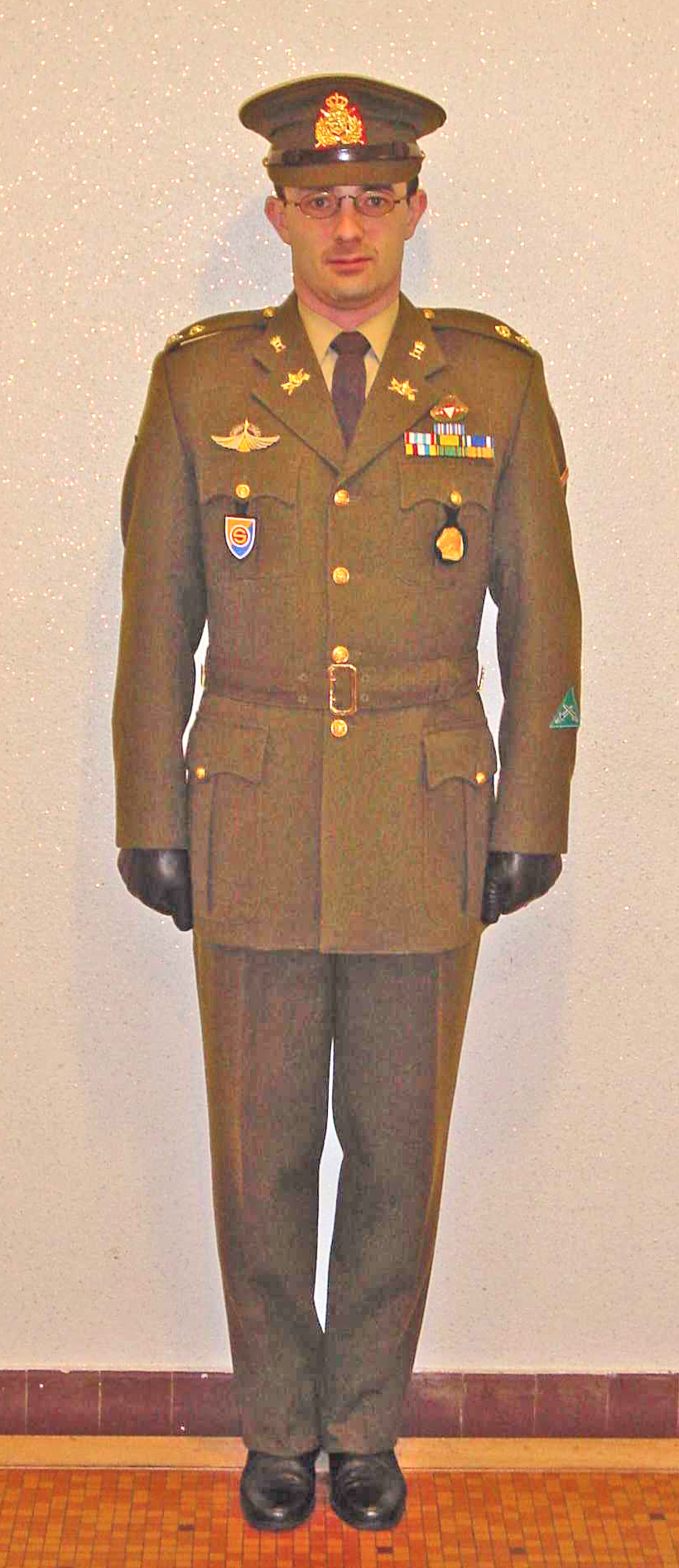 Lëtzebuerger Arméi Uniform Tenue S2 mat Képi